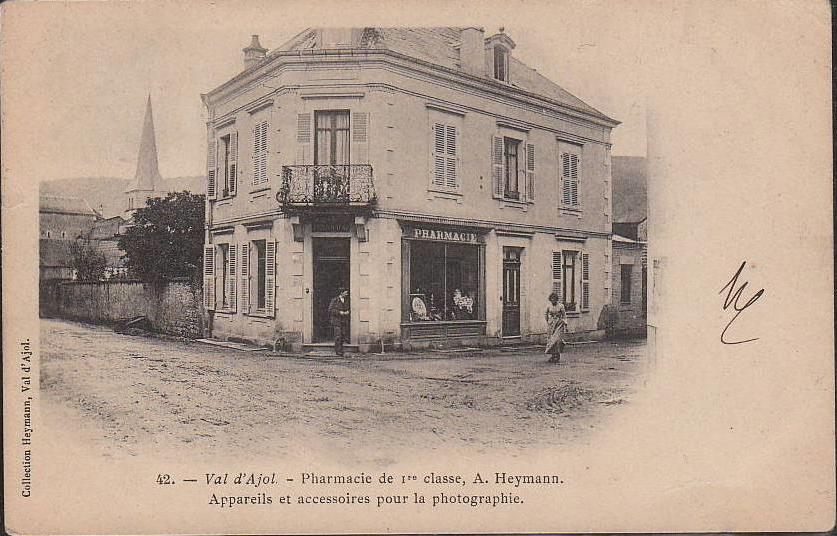 Carte postale ancienne, du début 1900, de la Pharmacie de Albert Heymann, au Val-d'Ajol (88). Pharmacie de 1ère Classe. Appareils et accessoires pour la Photographie.